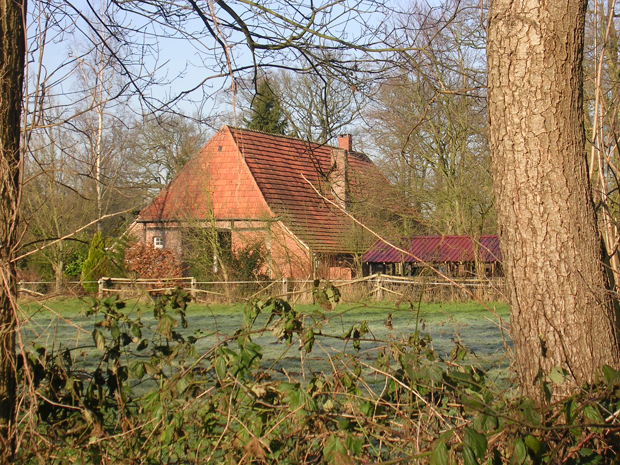 Dulinks Hus, Frenswegen, Nordhorn, Niedersachsen, Deutschland